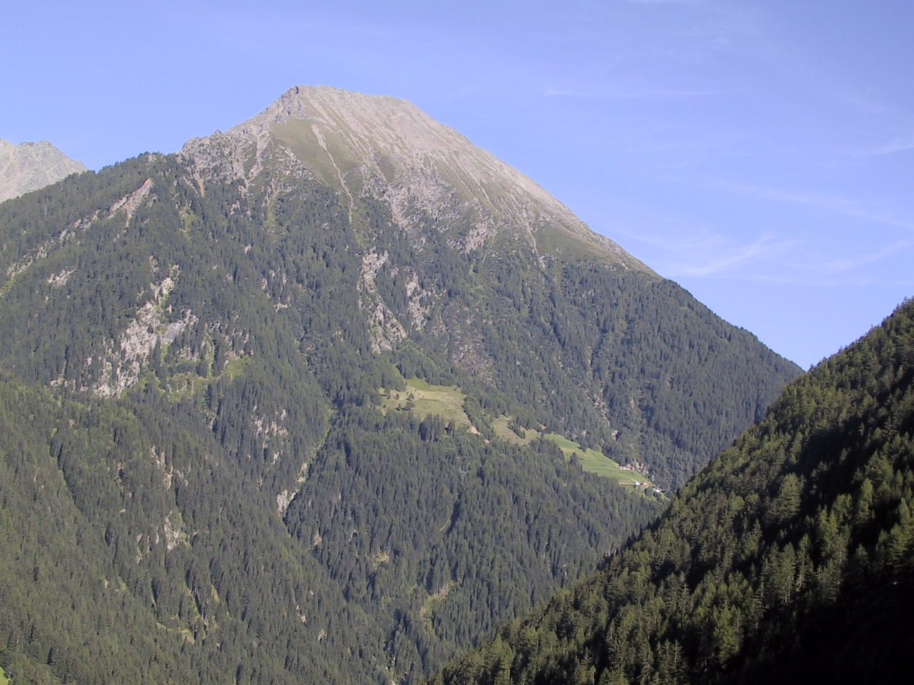 Die Westflanke der Eidechsspitze im Pfunderertal